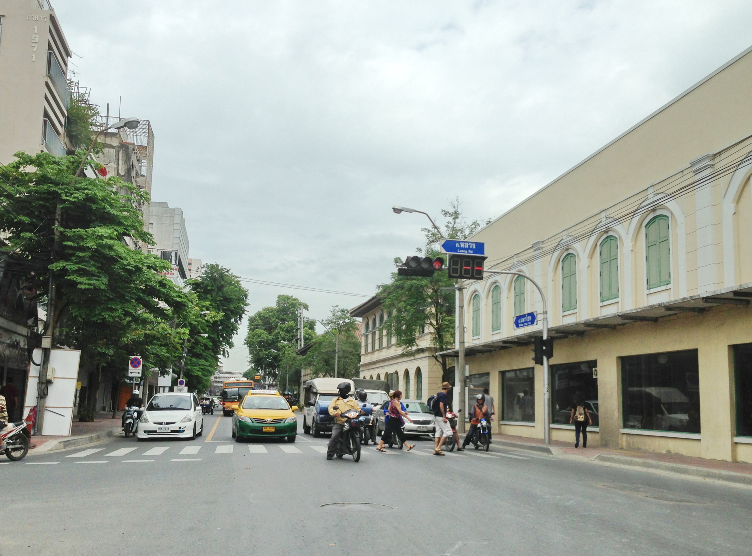 Mahachai,Correction Museum, Samran Rat,bangkok